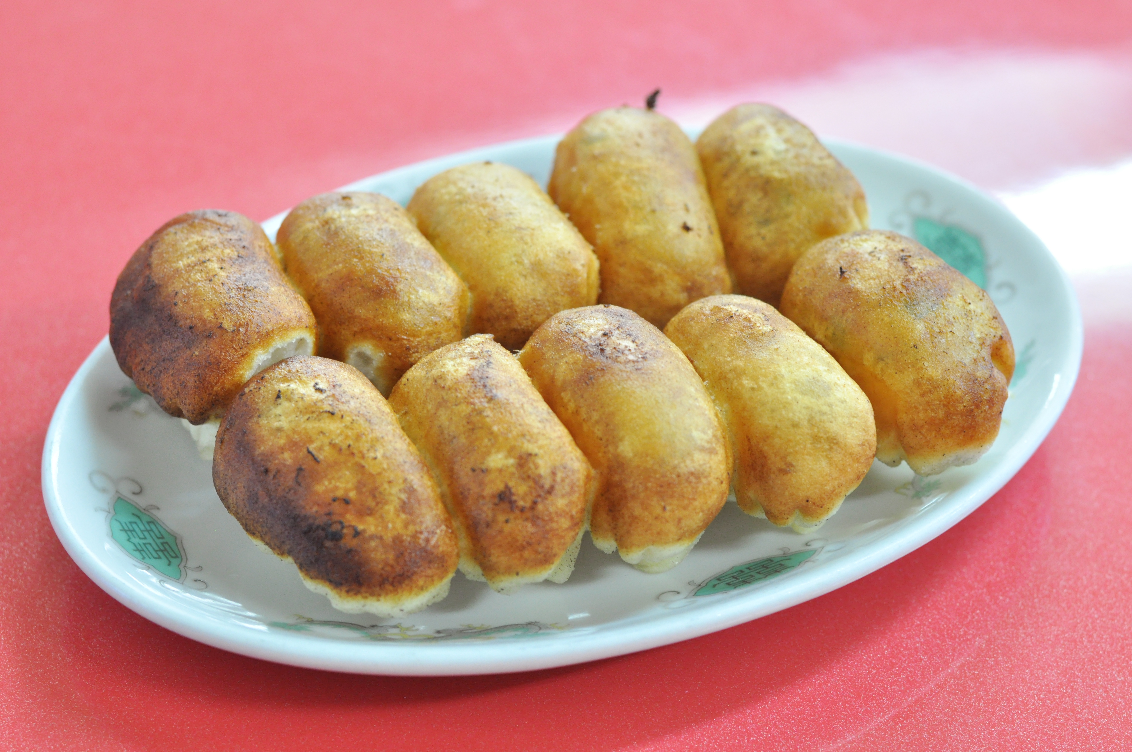 千葉県野田市のホワイト餃子野田本店の餃子1人前